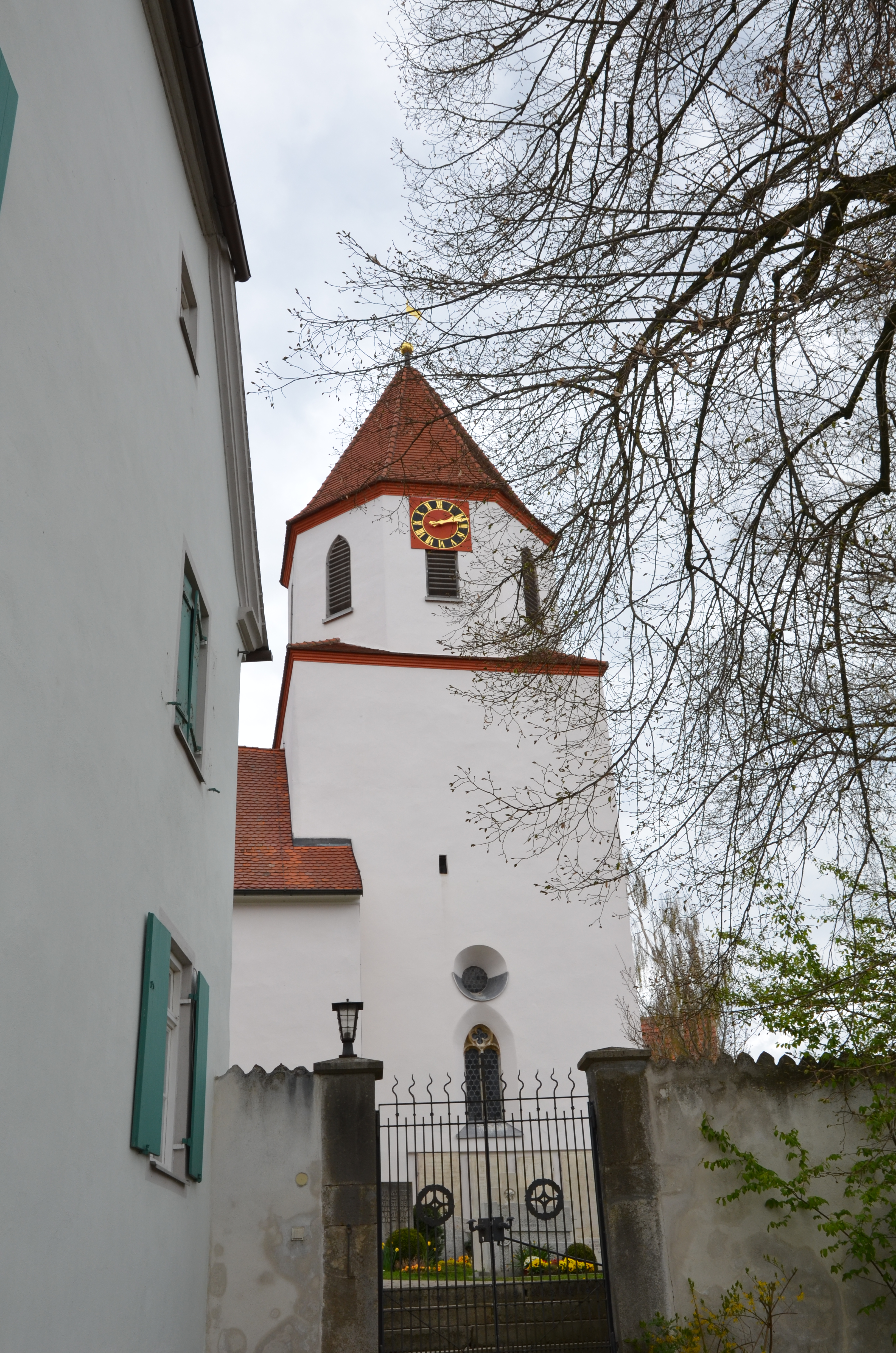 evang.-luth. Kirche St. Maria in Ostheim evang.-luth. Kirche St. Maria und Anna in Wörnitzostheim